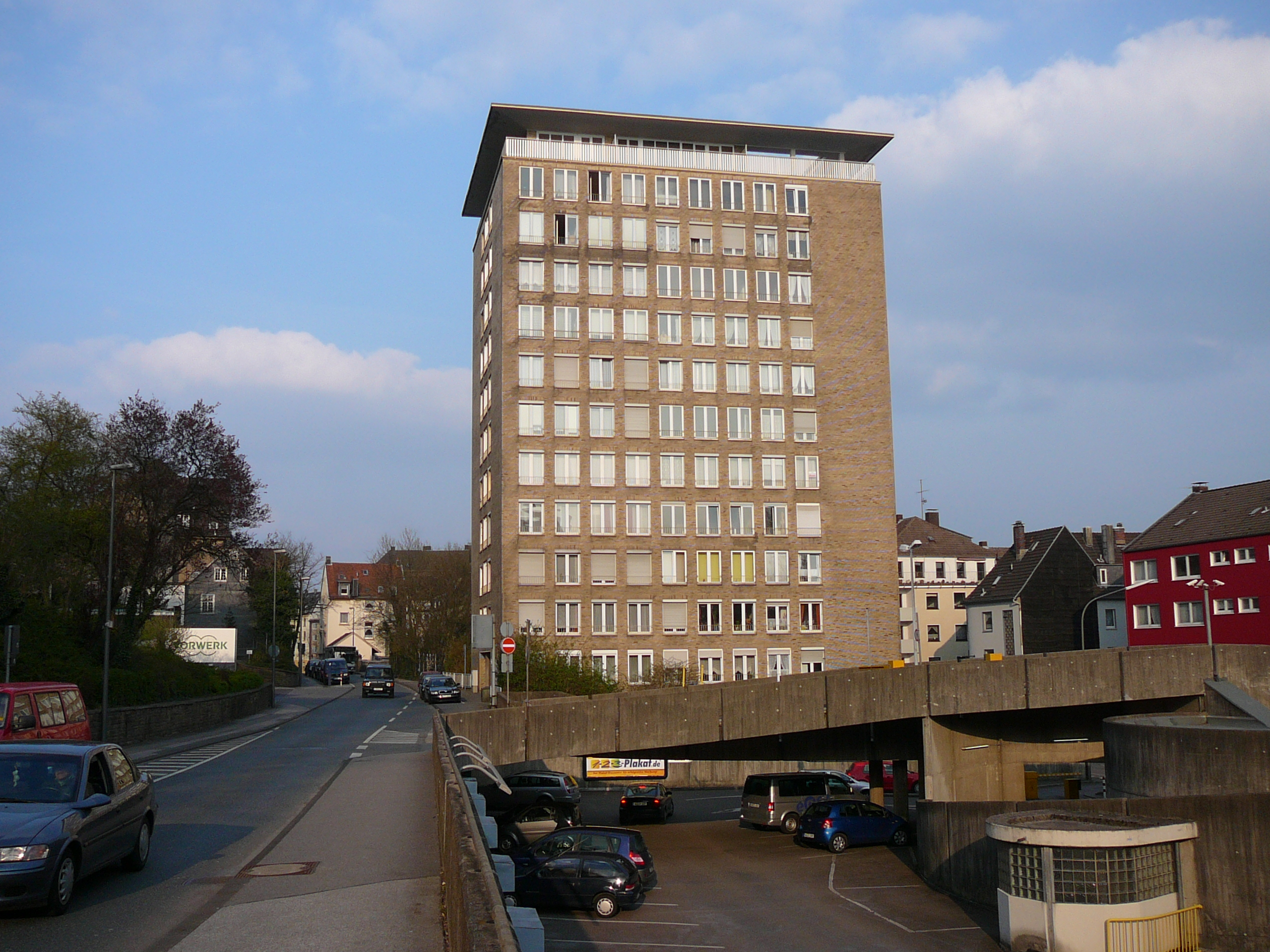 Mühlenweg, Wuppertal-Barmen